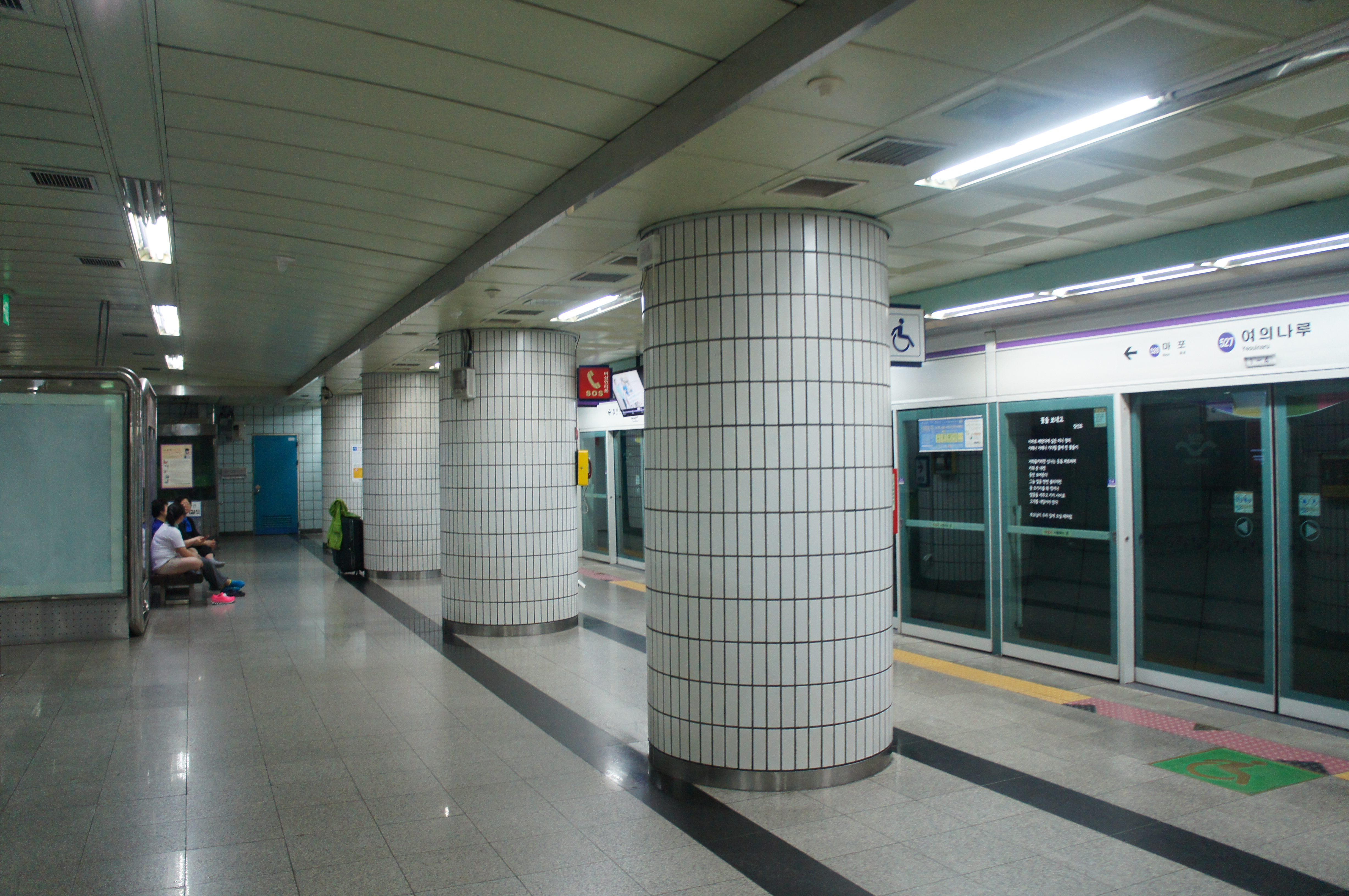 여의나루역 승강장